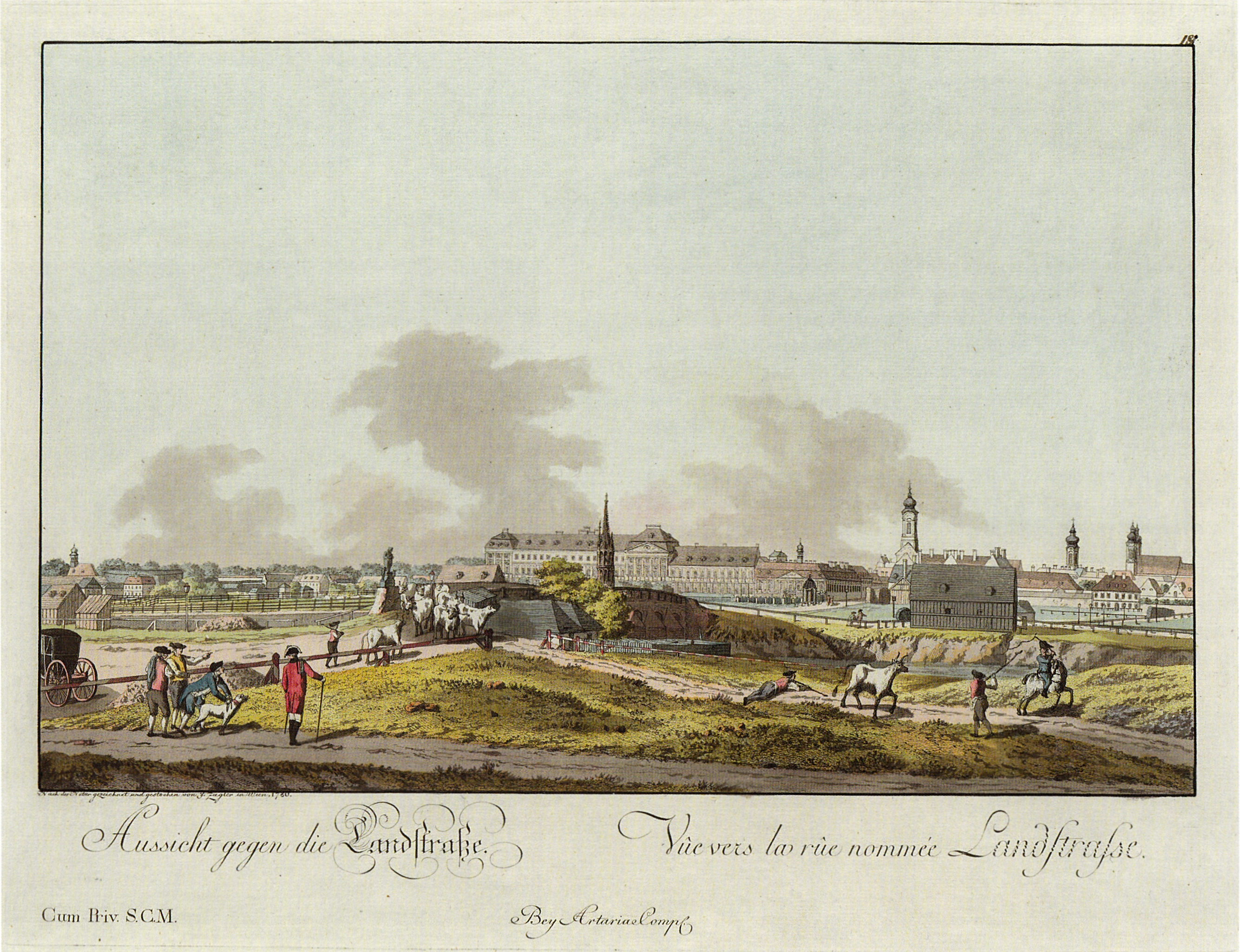 Aussicht gegen die Landstraße. Nach der Natur gezeichnet und gestochen von J. Ziegler in Wien, 1780. Bey Artaria Comp.